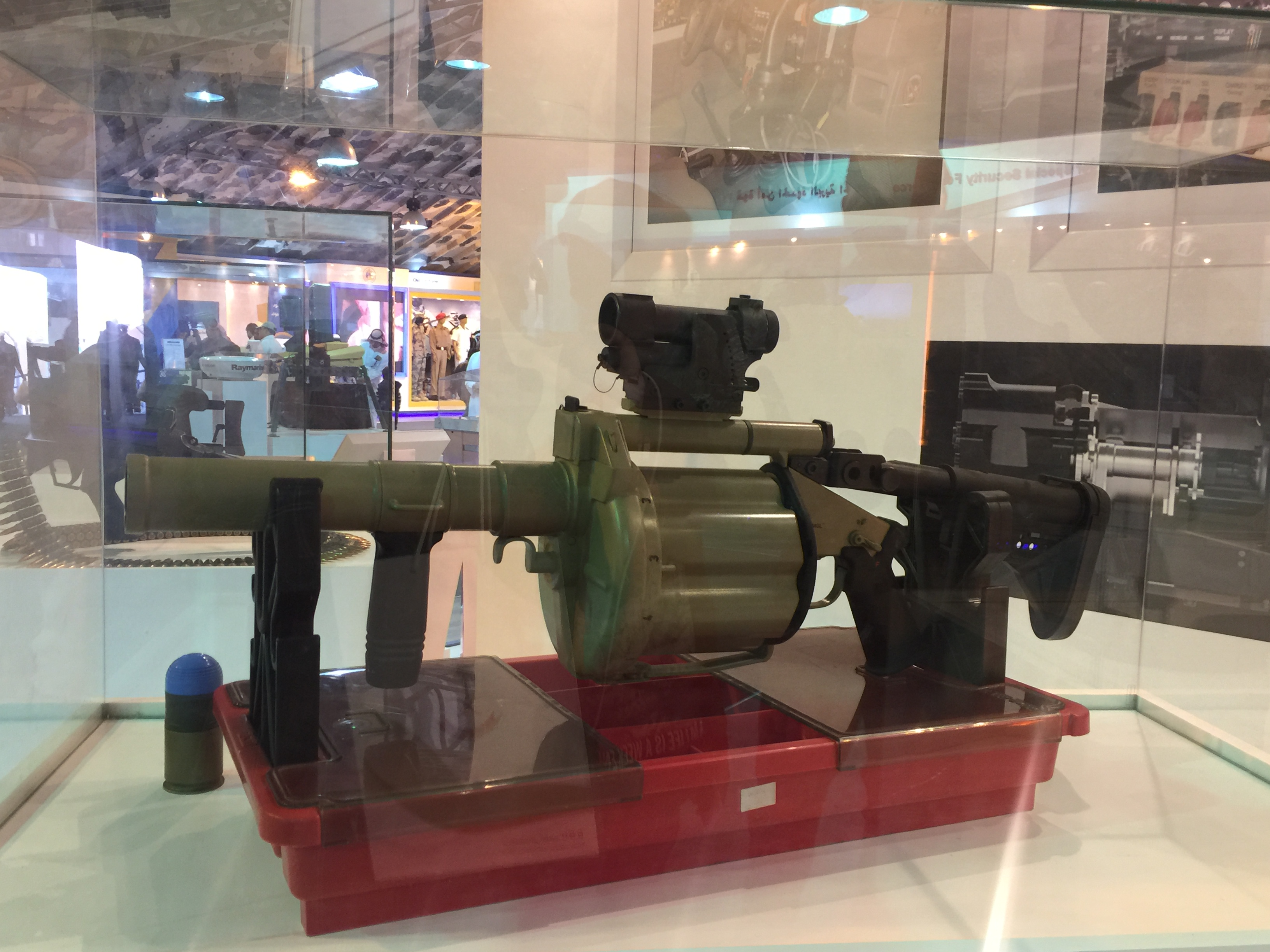 سلاح Milkor MGL التابع لحرس الحدود السعودي في مهرجان الجنادرية.